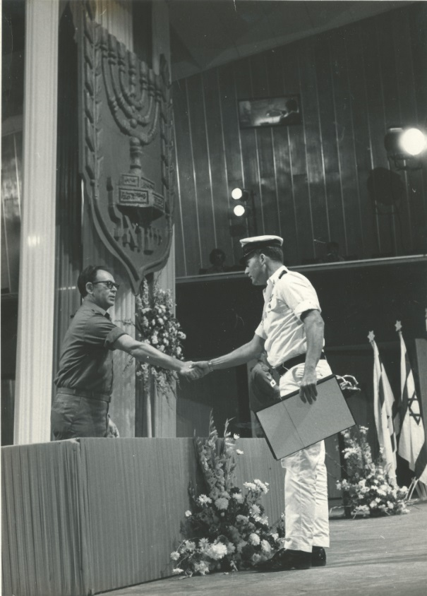 סרן צביקה שחק מקבל את עיטור המופת מהרמטכ"ל מרדכי גור